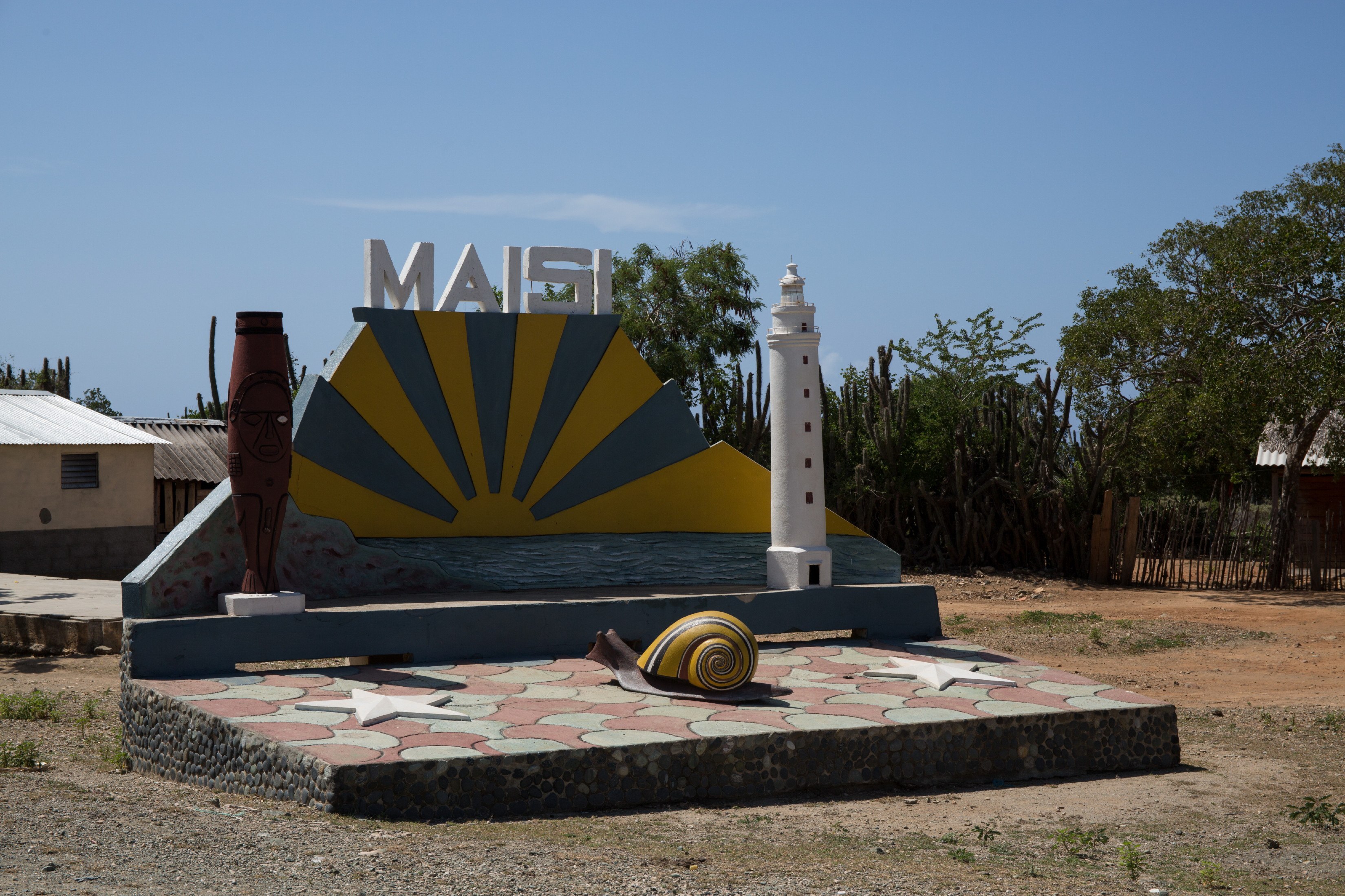 Beginn des Municipios Maisí, von Westen kommend